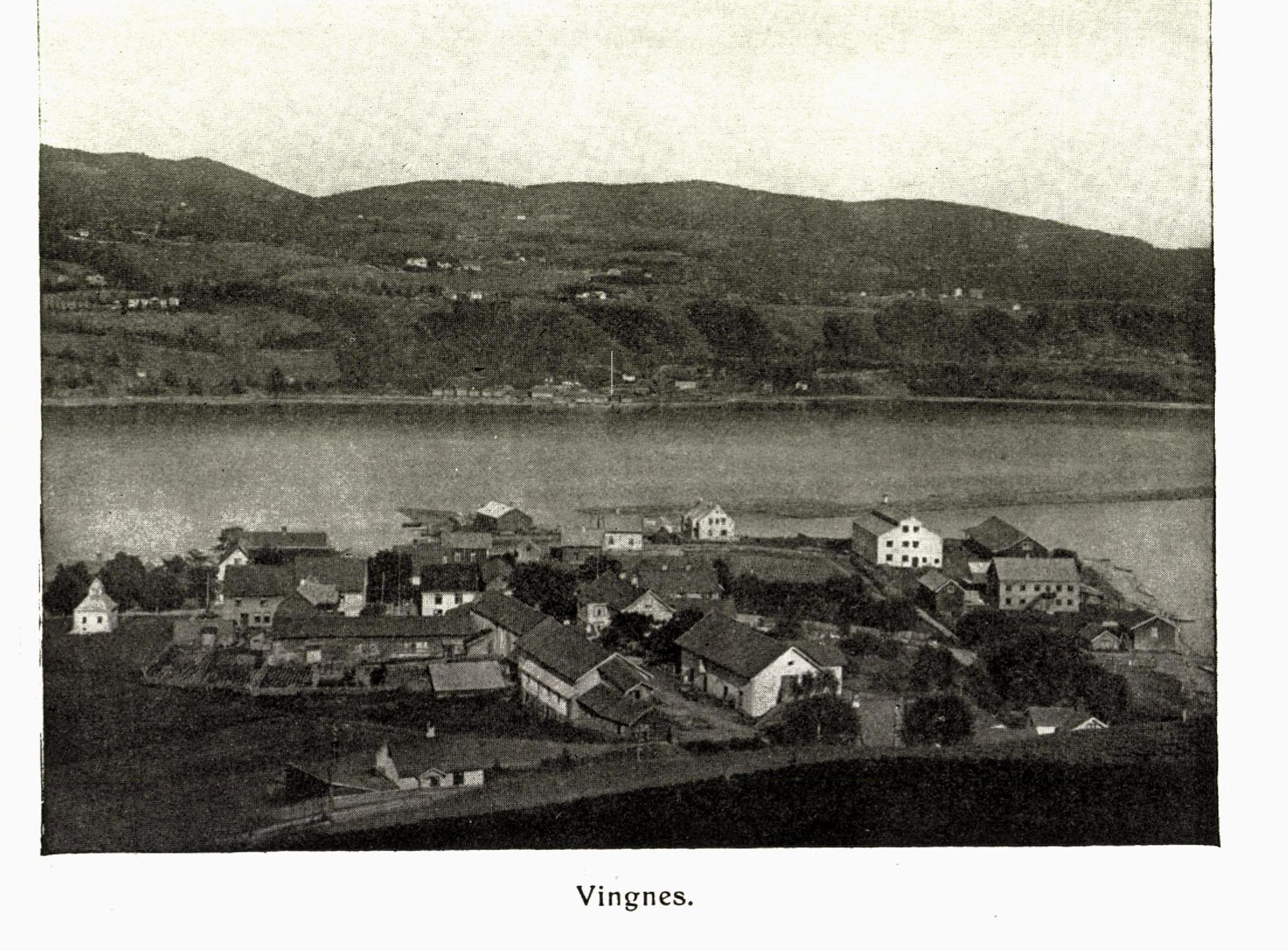 Illustrasjon hentet fra boken "Lillehammer 1827-1927" av og utgitt av (Lillehammer, 1927)